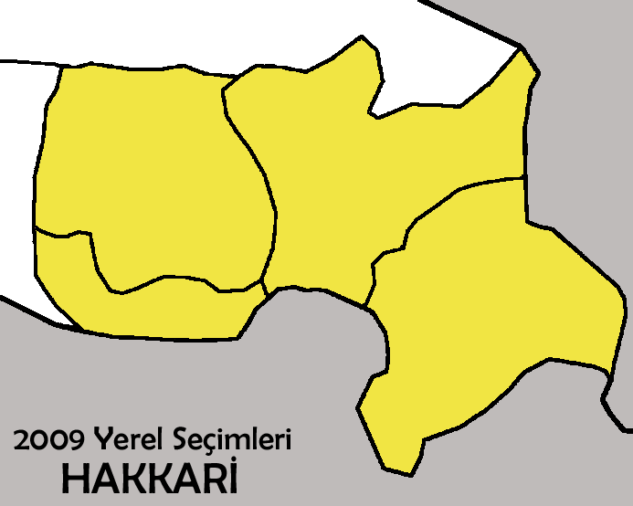 2009 Türkiye yerel seçimleri